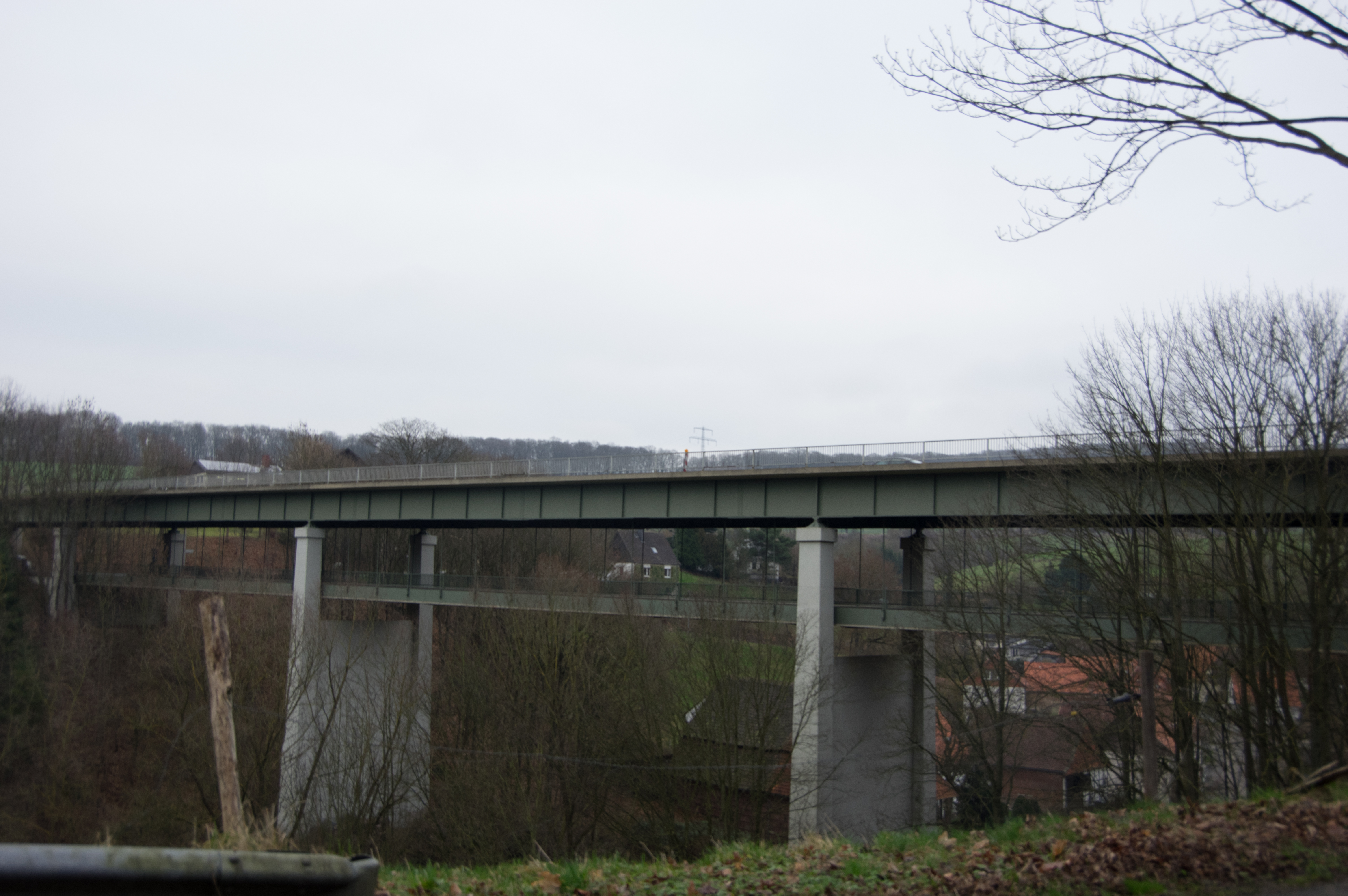 Einbeck, Ortsteil Kuventhal in Niedersachsen. Die Brücke steht unter Denkmalschutz. Sie führt über die Bundesstraße 3.